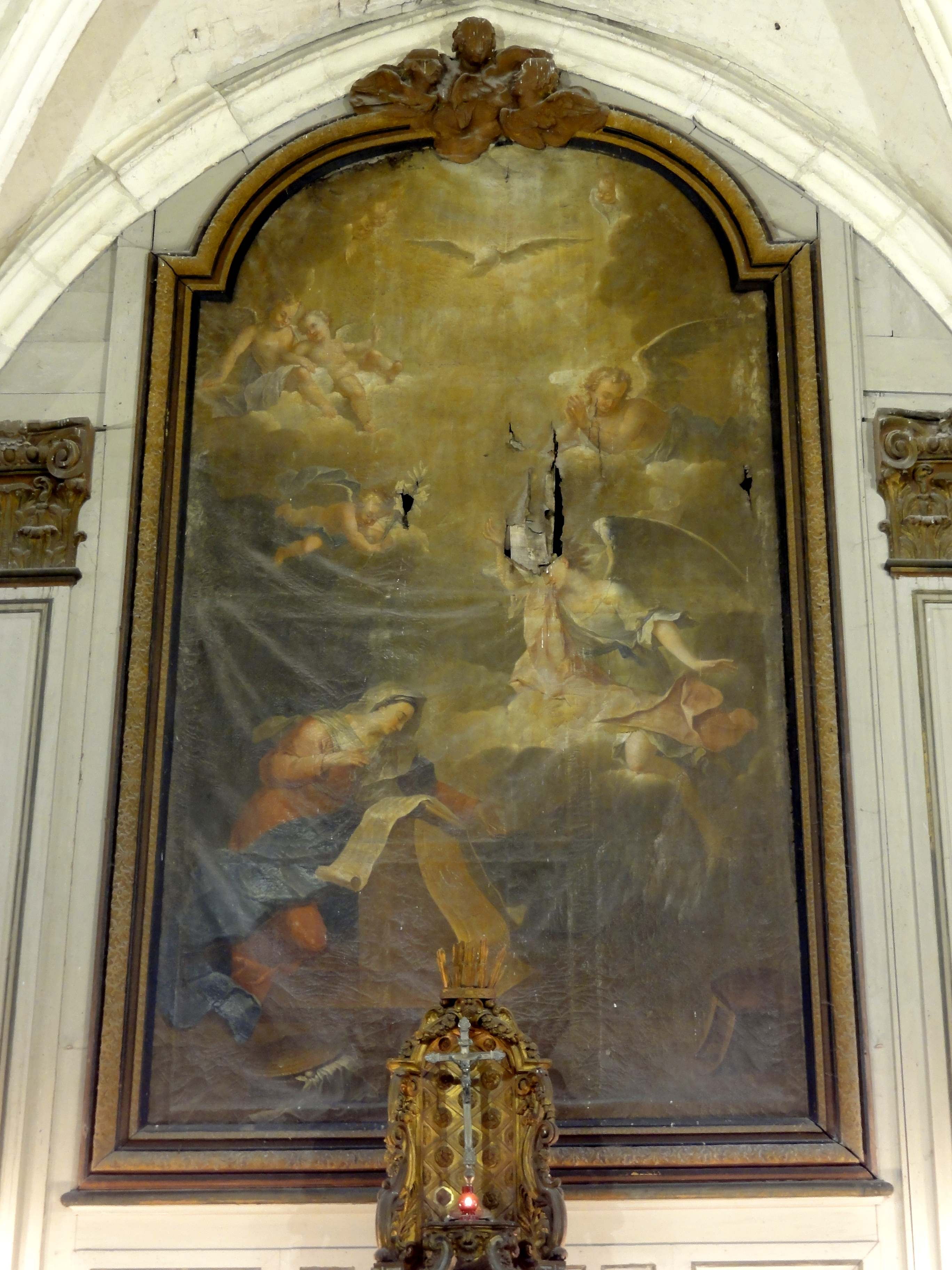 Vaisseau central, retable majeur, tableau.